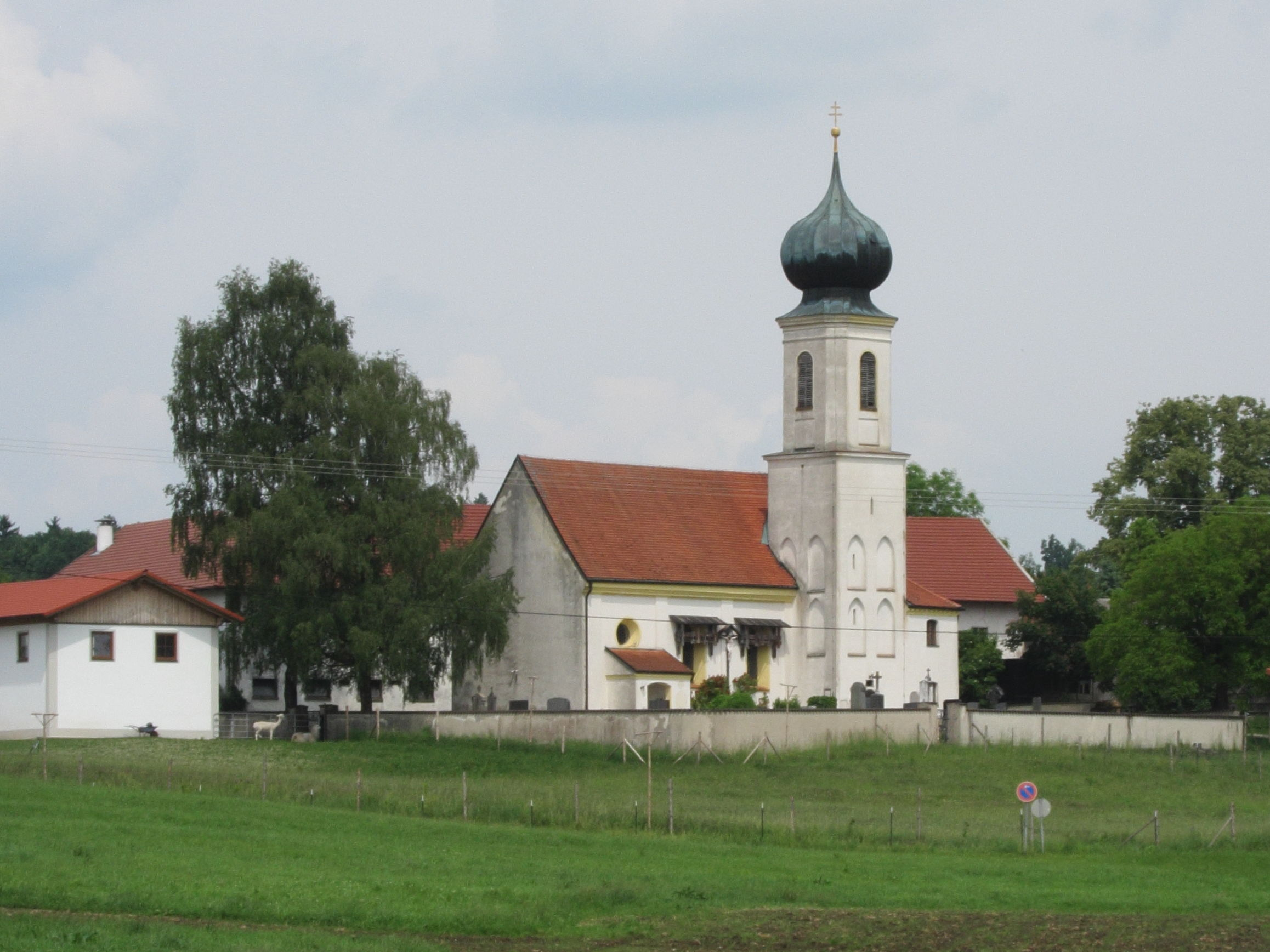 Kronacker14; katholische Filialkirche St. Johannes d. Ev., barocker Neubau 1725, Turmunterteil spätgotisch; mit Ausstattung.